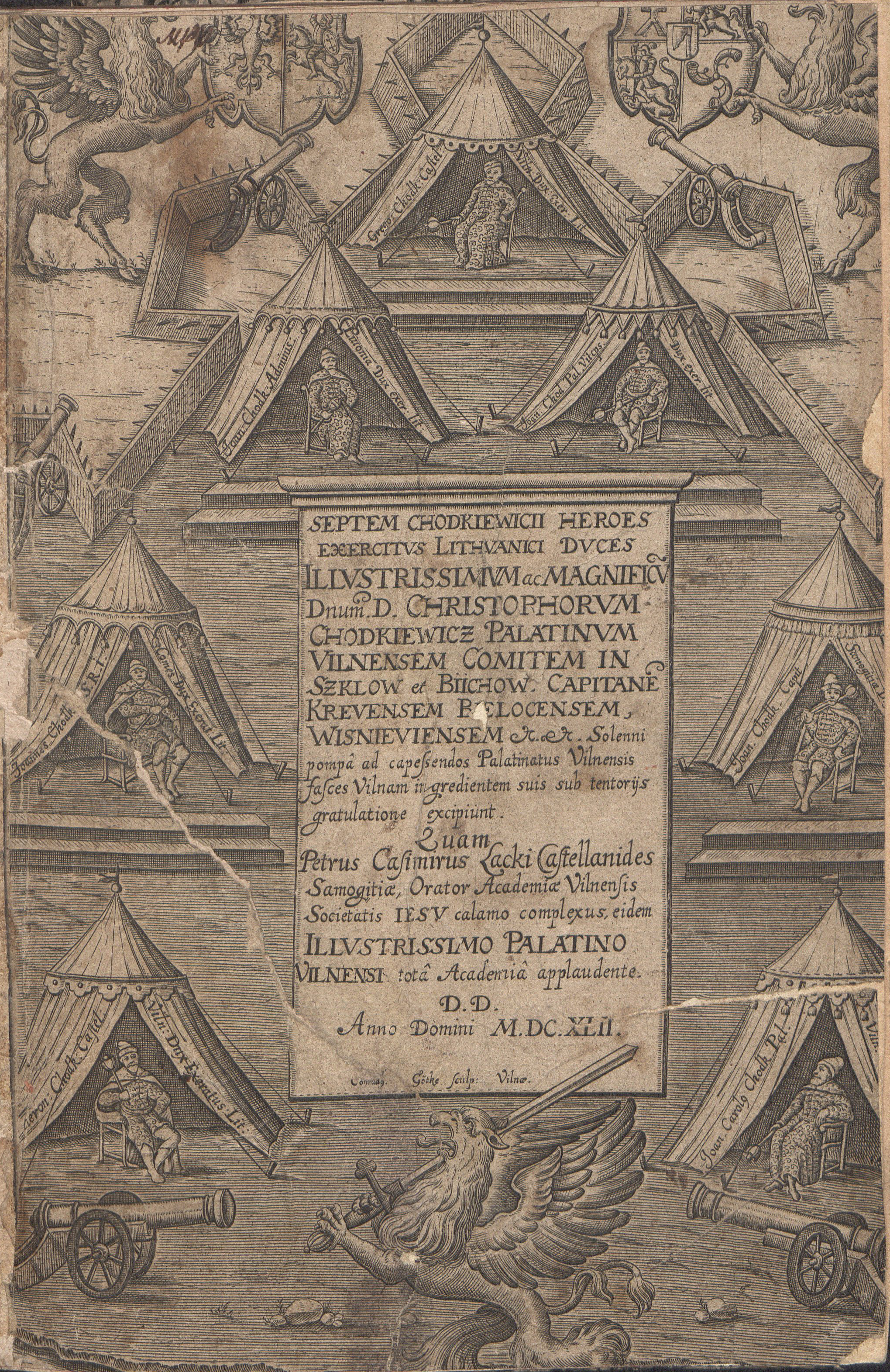 Беларуская (тарашкевіца): Кніга Пятра Казімера Ляцкага пра глярыфікацыю роду Хадкевічаў (Chadkievičy) «Septem Chodkiewicii heroes exercitvs Lithvanici dvces [...] Christophorvm Chodkiewicz palatinvm Vilnensem comitem in Szklow et Biichow, capitan[eum] Krevensem Bielocensem, Wisnieviensem etc. etc. sollenni pompa ad capessendos palatinatus Vilnensis fasces Vilnam ingredientem suis sub tentorijs gratulatione excipiunt», выдадзеная ў друкарні Віленскай езуіцкай акадэміі